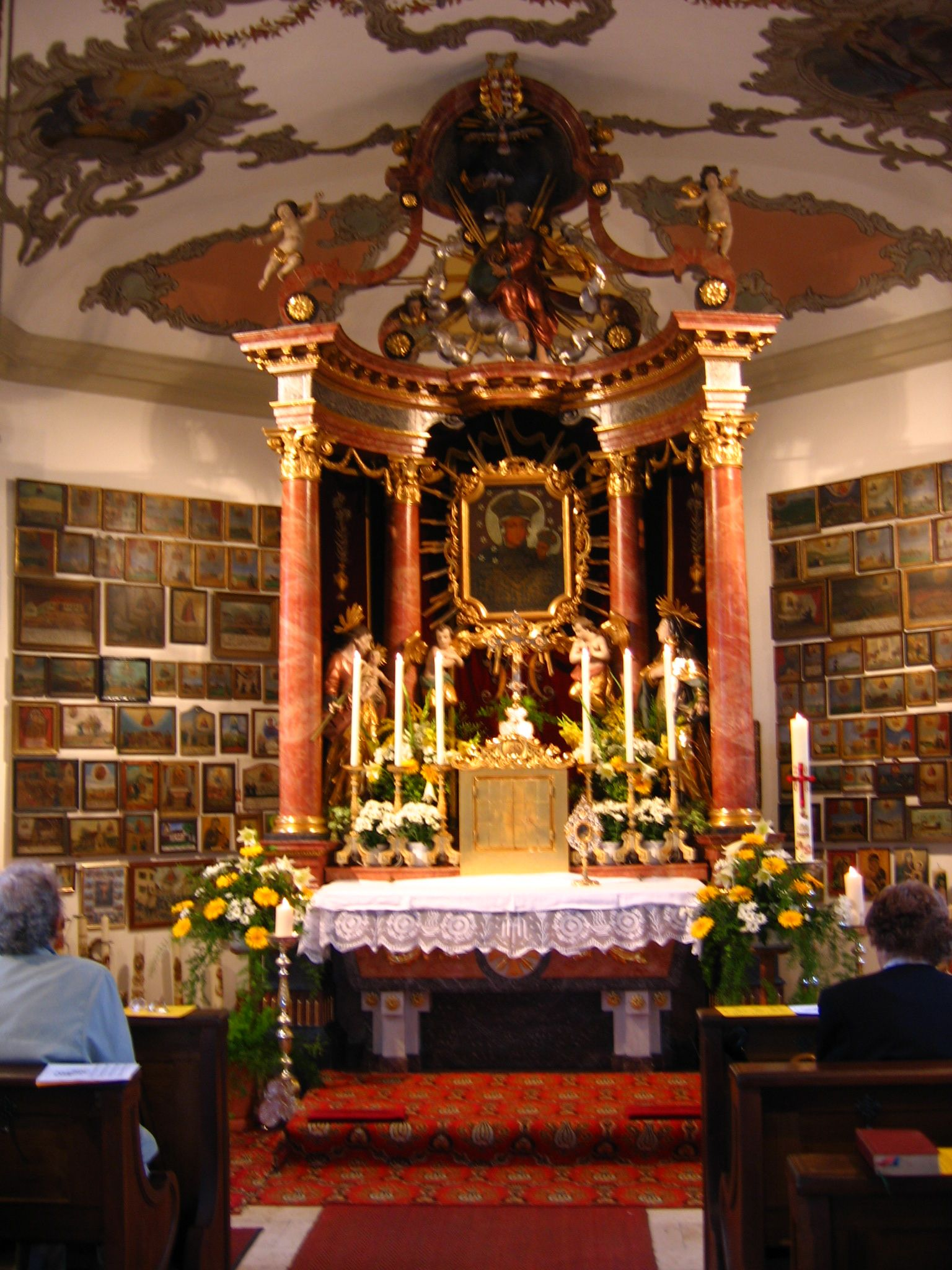 Maria imGnasdenfeld mit dem Bild von der schwarzen Madonna aus Tschenstochau